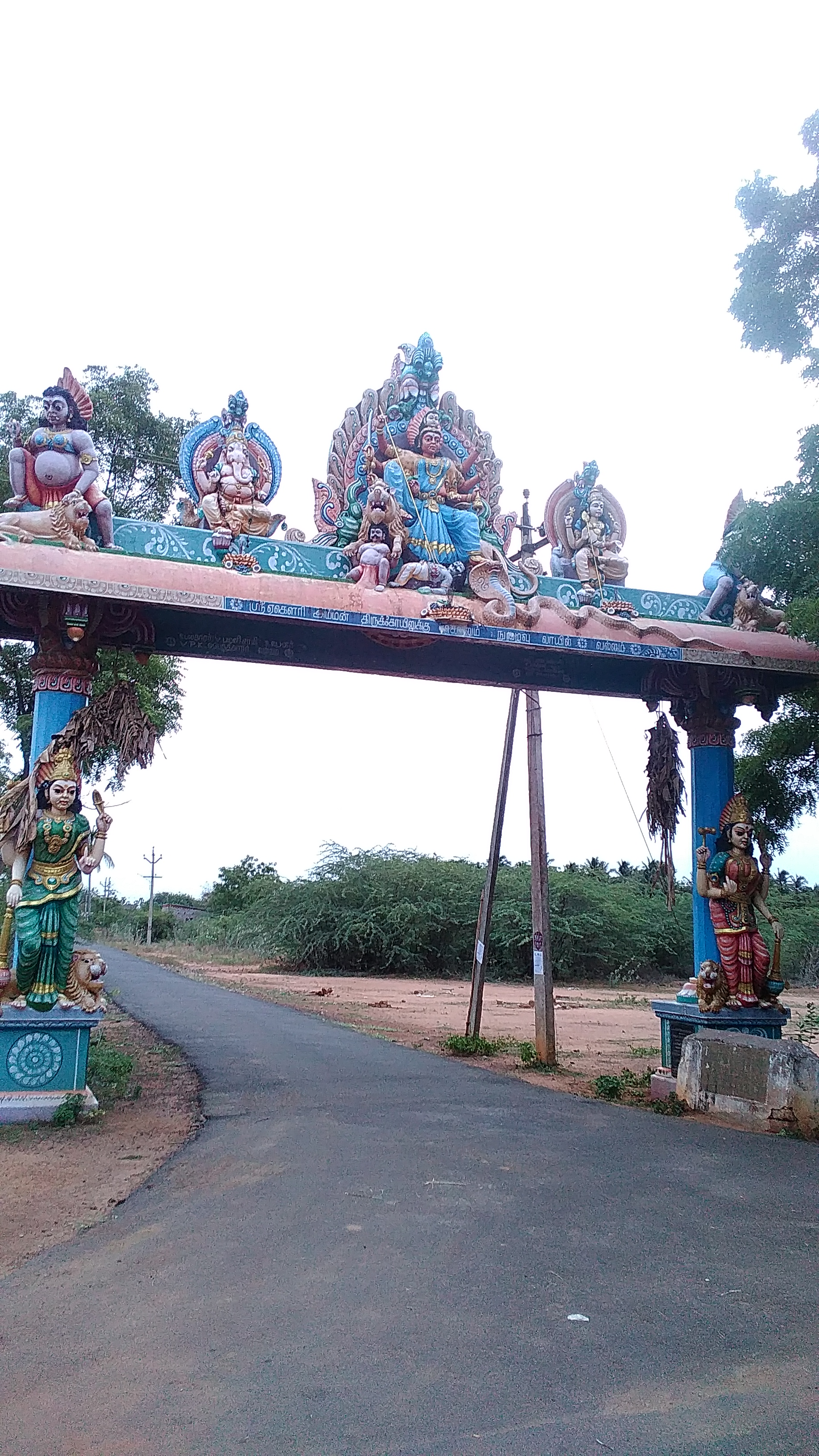 ஏகெளரி அம்மன் கோயிலுக்குச் செல்லும் வழி